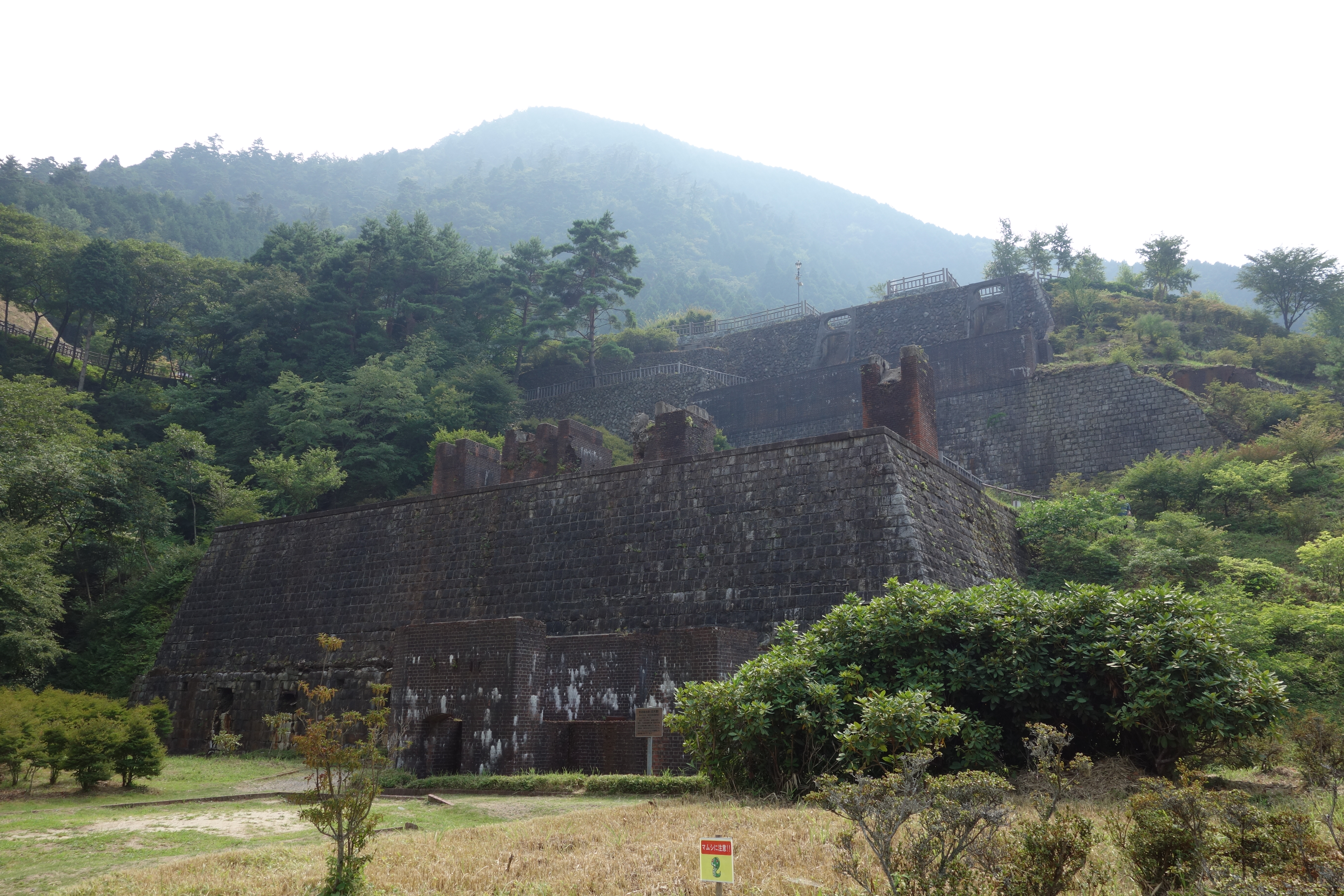 東平索道基地跡 2013年8月撮影